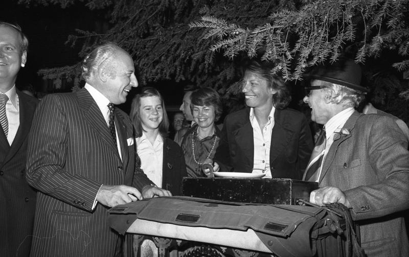 Laubenpieperfest in Anwesenheit von Bundespräsident Walter Scheel und Frau Mildred in der Landesvertretung Berlin in Bonn